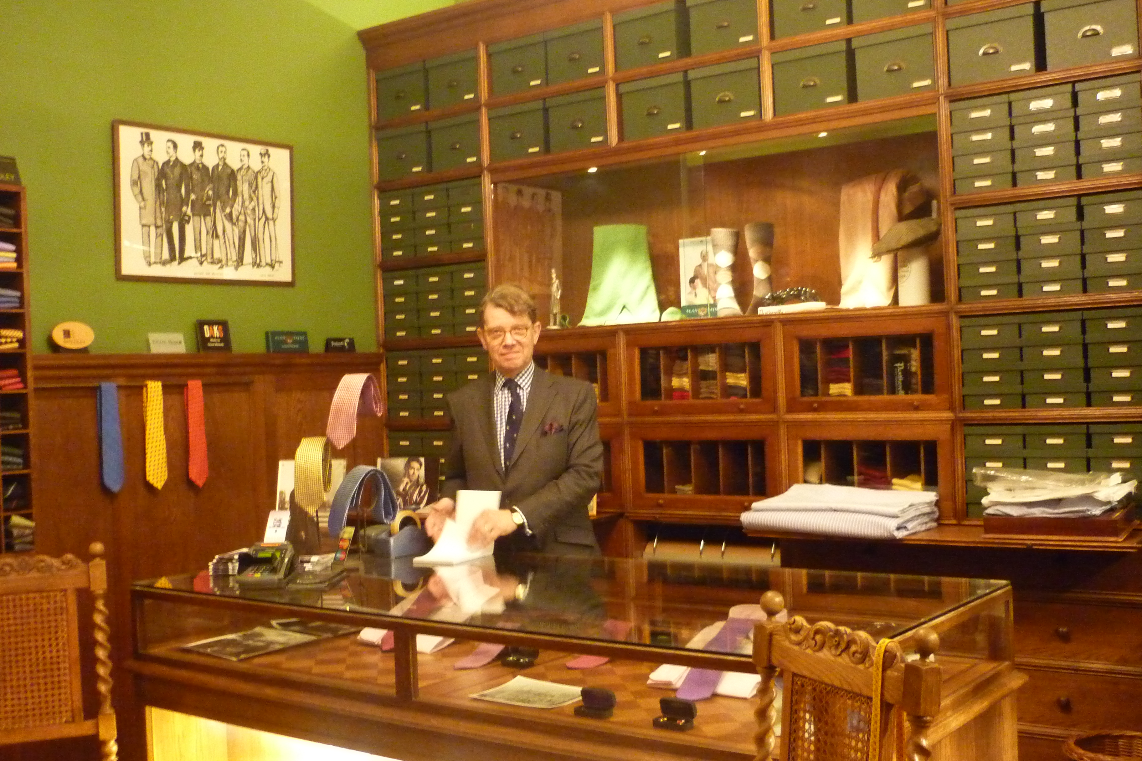 F G van den Heuvel, eigenaar van F G van den Heuvel